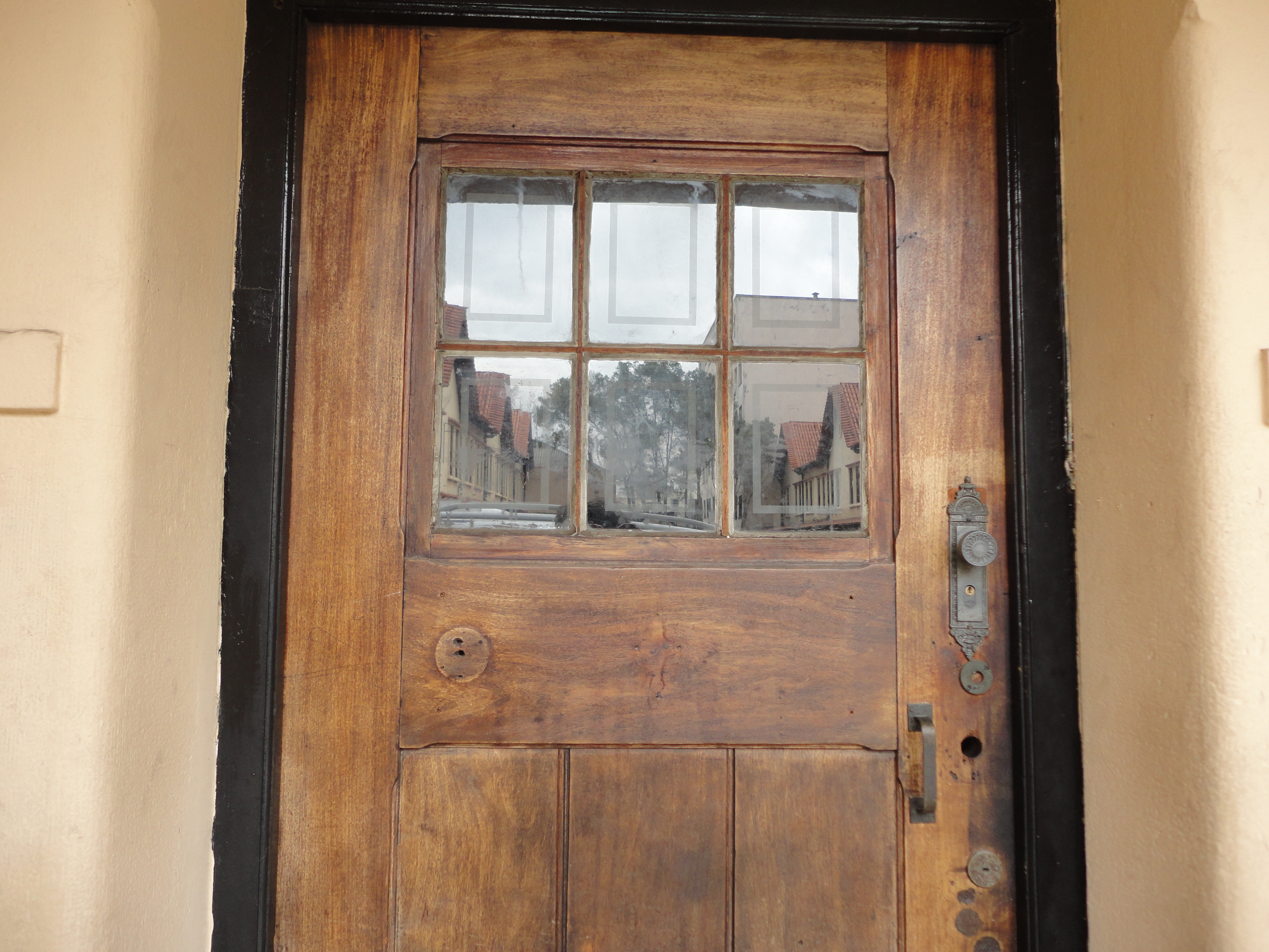 Detalhe da porta de casa da Vila dos Ingleses, em São Paulo (SP), Brasil.